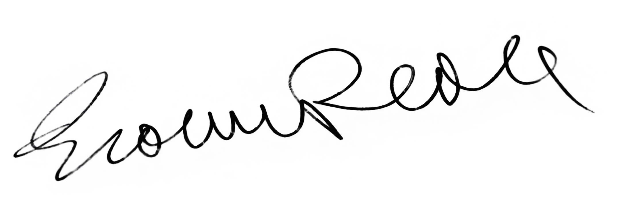 Signature of italian philosopher Giovanni Reale. Photo of the original signature edited by Vale93b in b/w; brightness reduced, contrast increased.